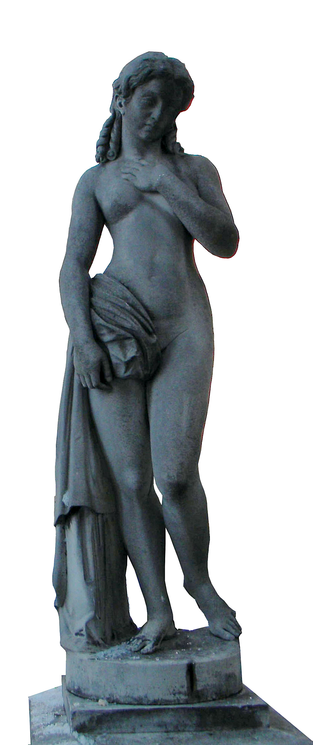 Decupaj din Fișier:Casa Monteoru-Uniunea Scriitorilor, Calea Victoriei nr. 115, Bucuresti sect. 1 (Statuie din gradina (2)).jpg